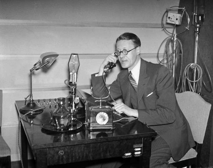 Kungsgatan 8, Radiotjänst. Sven Jerring i telefon